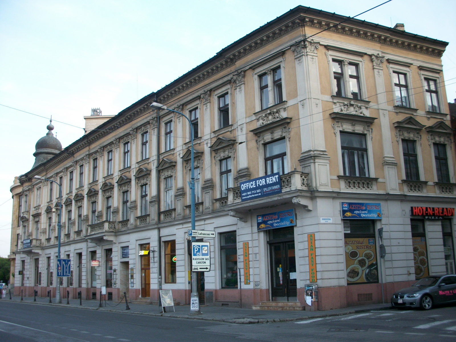 HOTEL